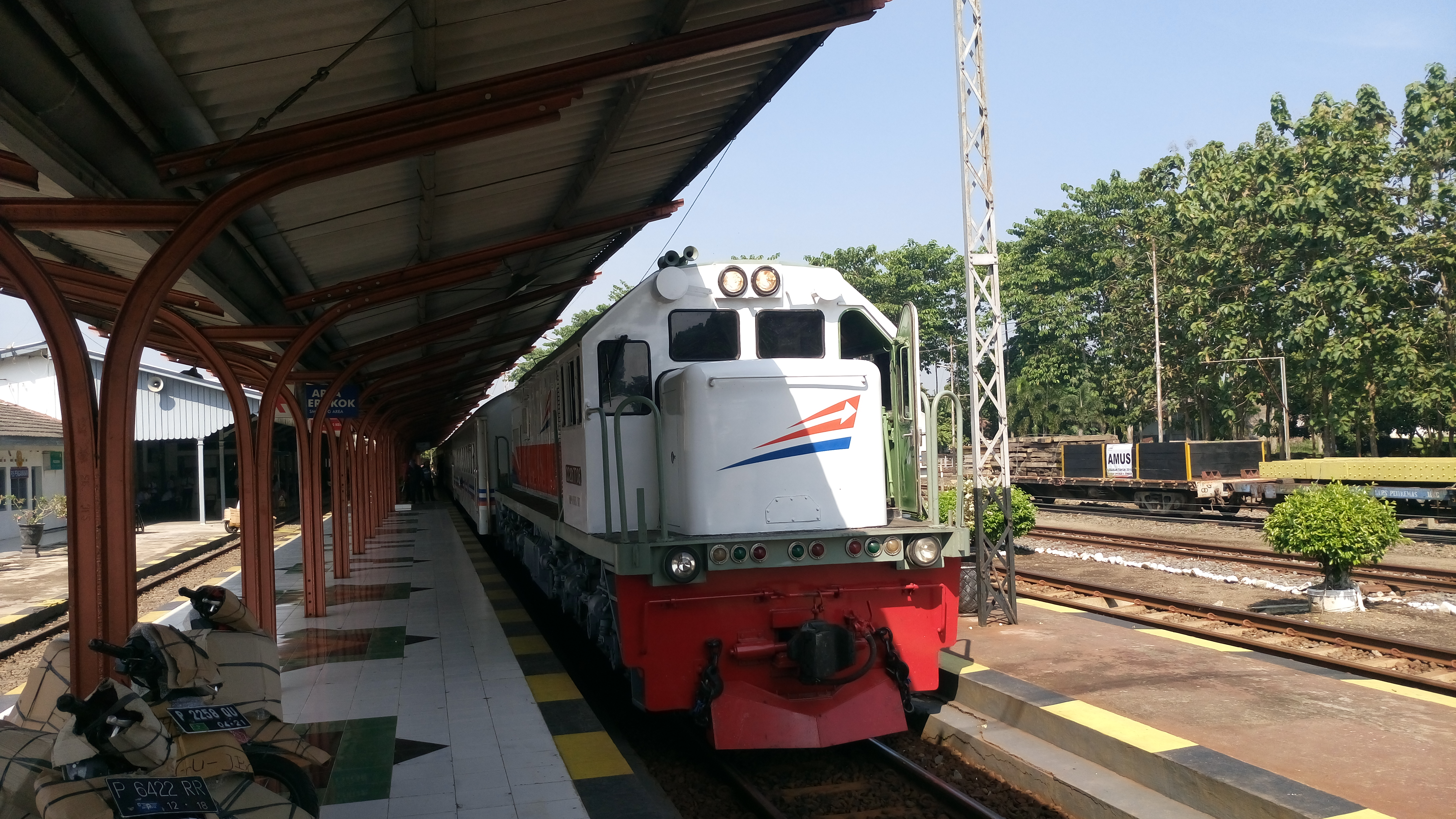 Kereta api Probowangi sedang berhenti di peron stasiun Jember